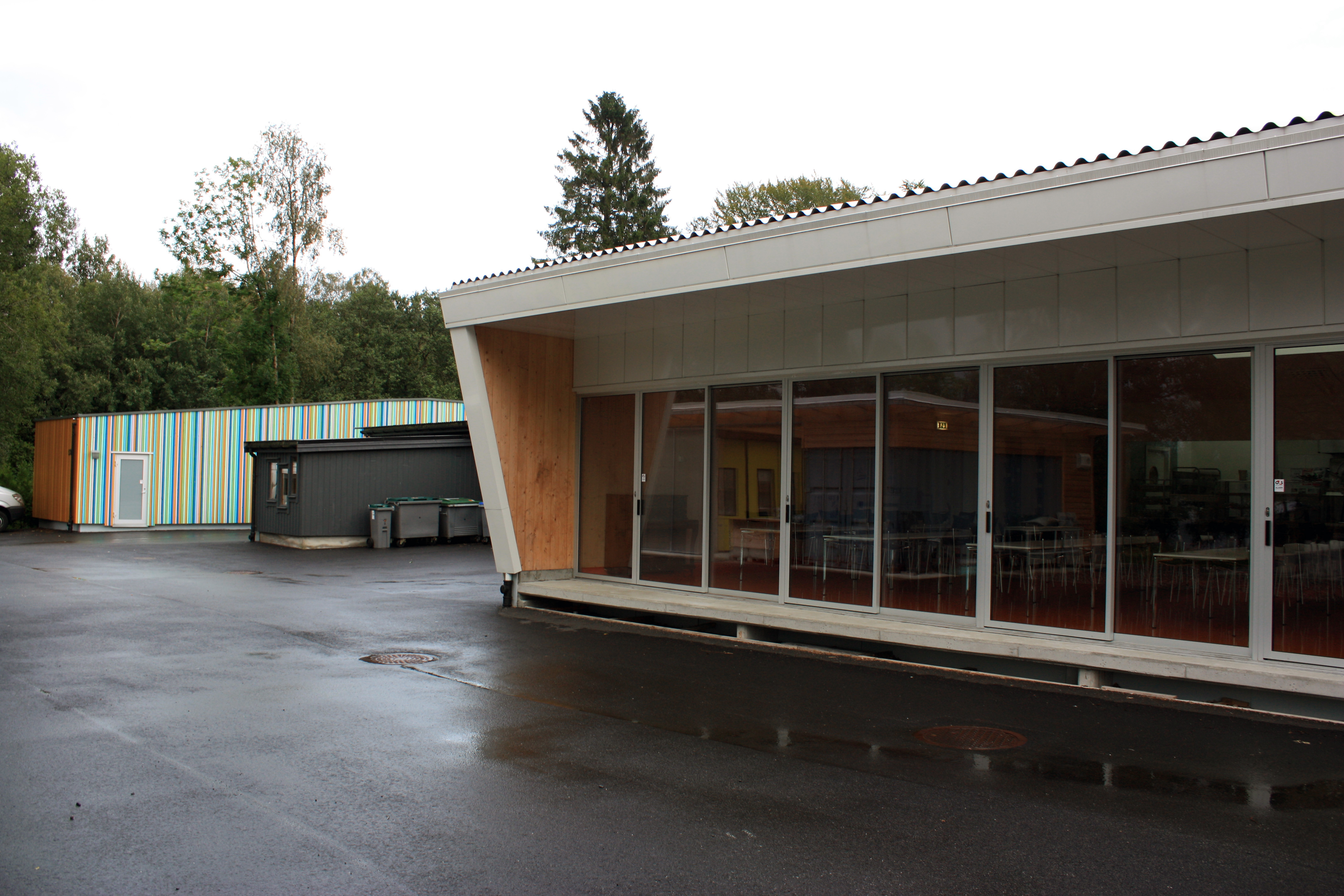 Steinerskolen på Skjold, Fana, Bergen.